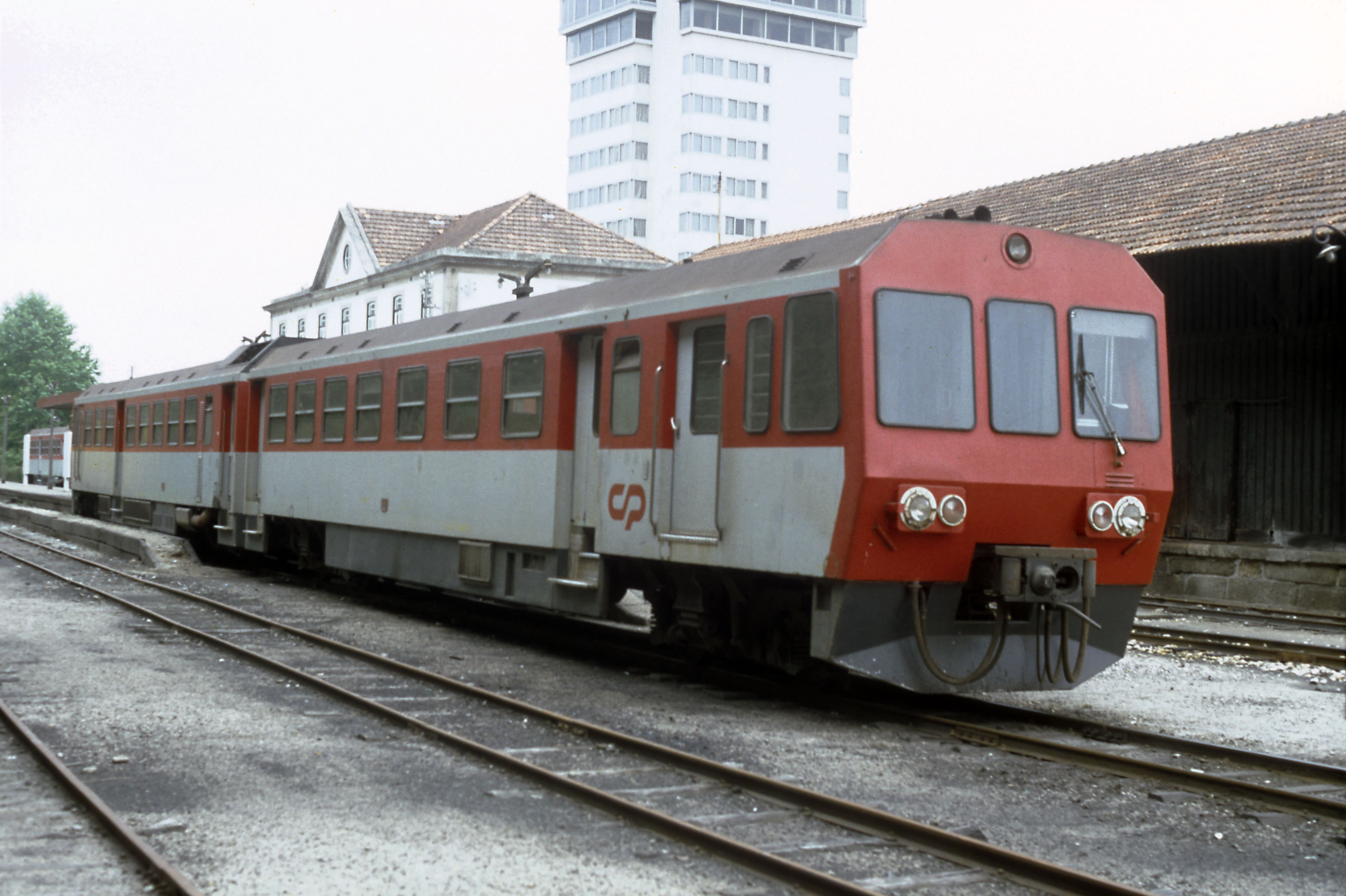 Bf Guimarães, Meterspurtriebzug der Reihe 9600. Die CP haben die EDV-Nummern nie wirklich oder gar aus Überzeugung eingeführt.